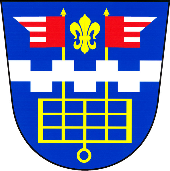 Znak obce Sulislav (okres Tachov)